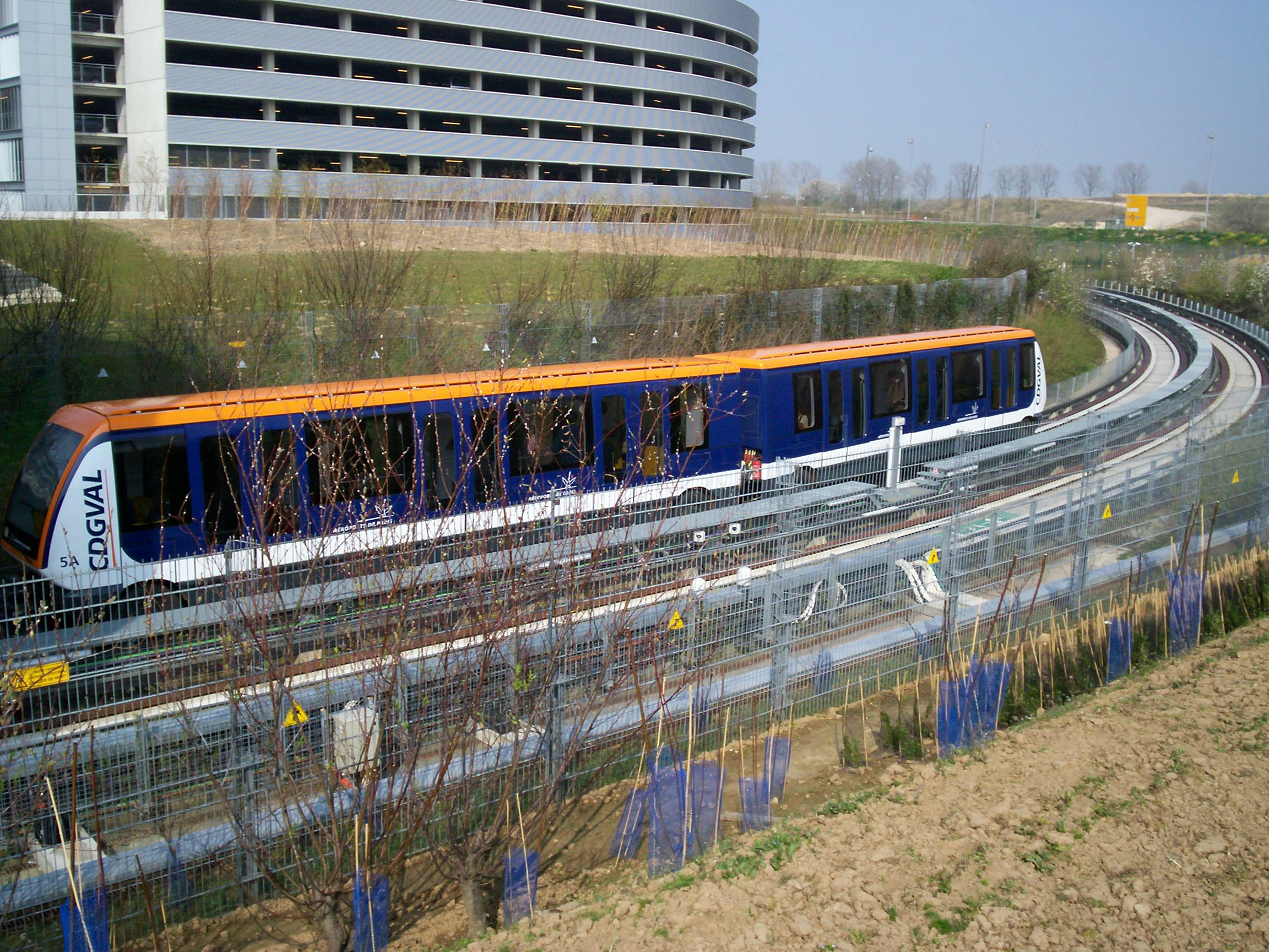 Rame Val208 arrivant à Parc PX